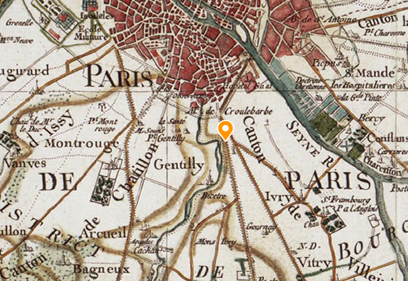 Avenue d'Italie (appelée alors route de Fontainebleau) sur la carte de Cassini, vers 1780 - Paris